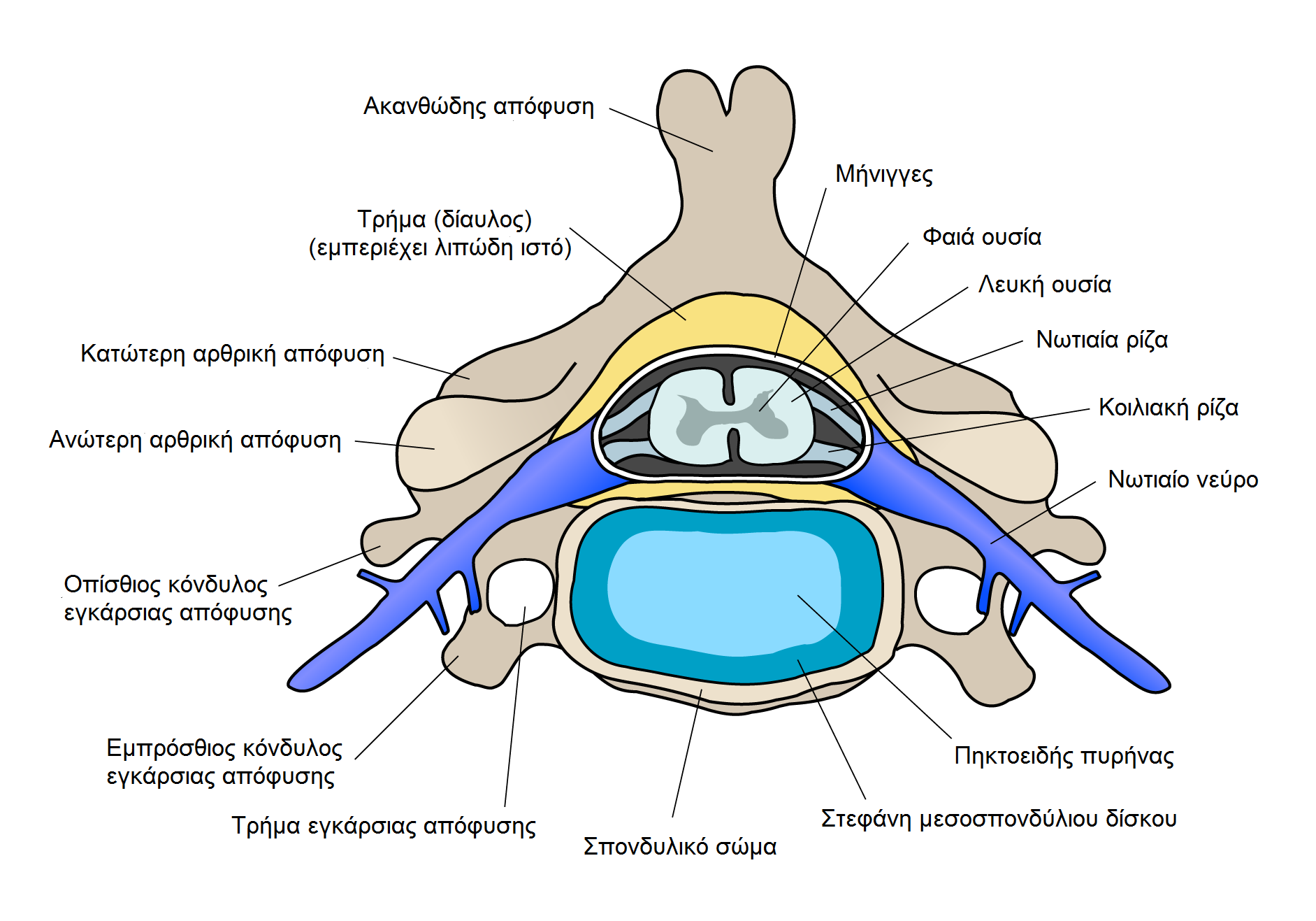 Αυχενικός σπόνδυλος με μεσοσπονδύλιο δίσκο